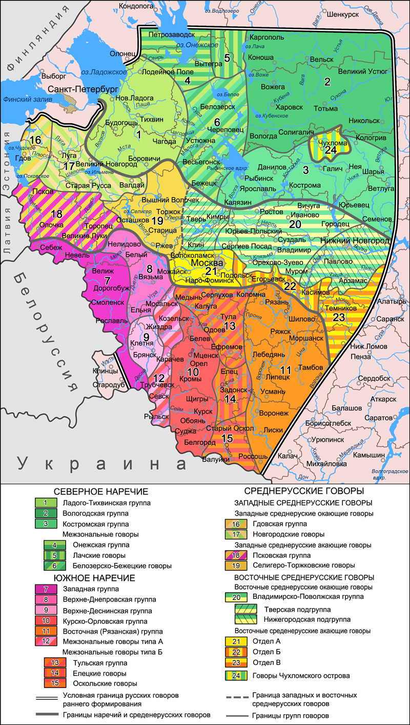 Диалектологическая карта русского языка 1965 года. На основе данных: К. Ф. Захарова, В. Г. Орлова. Диалектное членение русского языка. М.: Наука, 1970. 2-е изд.: М.: Едиториал УРСС, 2004 Русские. Монография Института этнологии и антропологии Федеральная целевая программа Русский язык. Региональный центр НИТ ПетрГУ